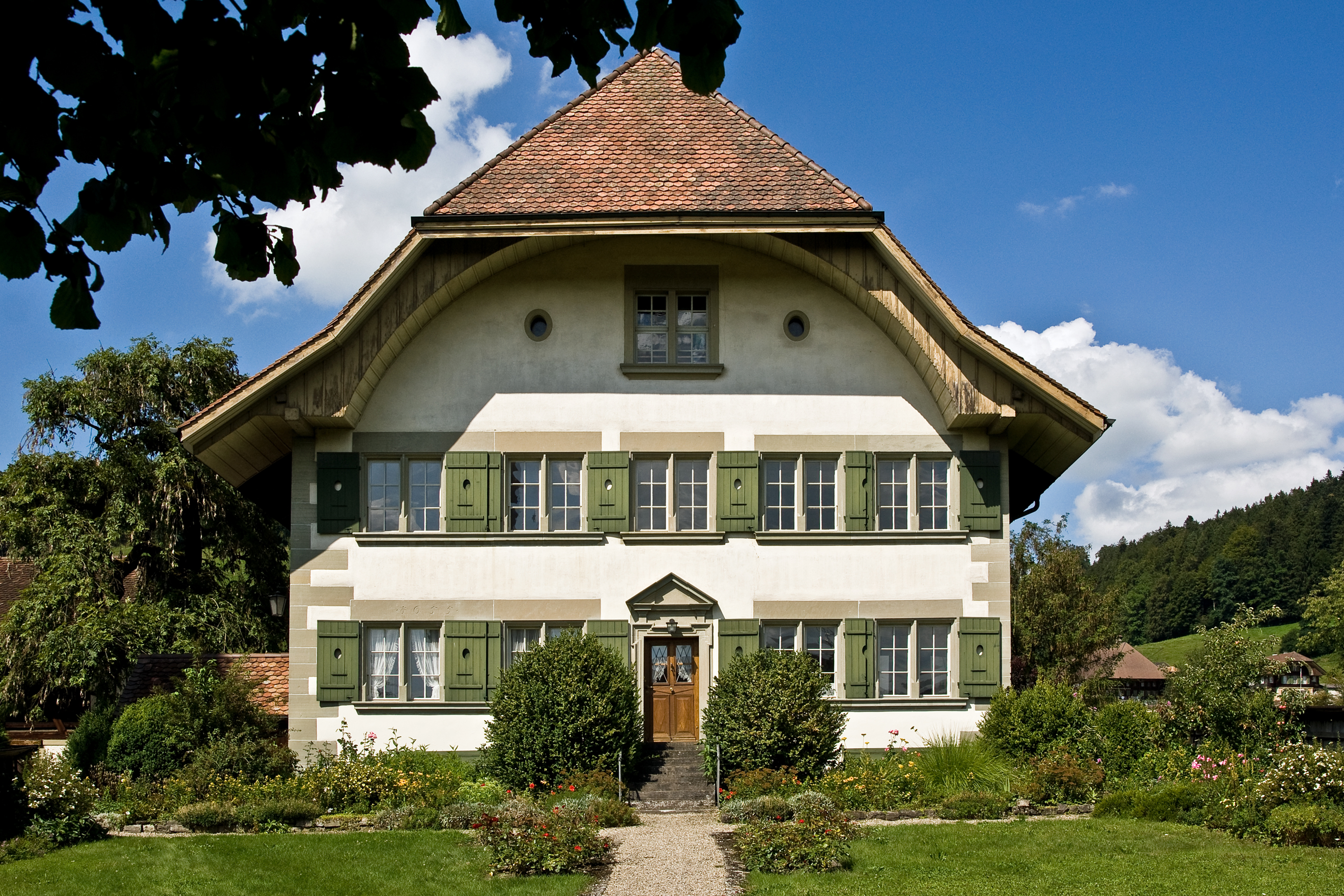 Pfarrhaus in Lützelflüh Kt. Bern, darin ist auch die Gotthelfstube untergebracht. Der bekannte Schweizer Schriftsteller Jeremias Gotthelf (Pfr. Albert Bitzius) war eben an diesem Ort Dorfpfarrer von 1831 bis zu seinem Tod 1854.